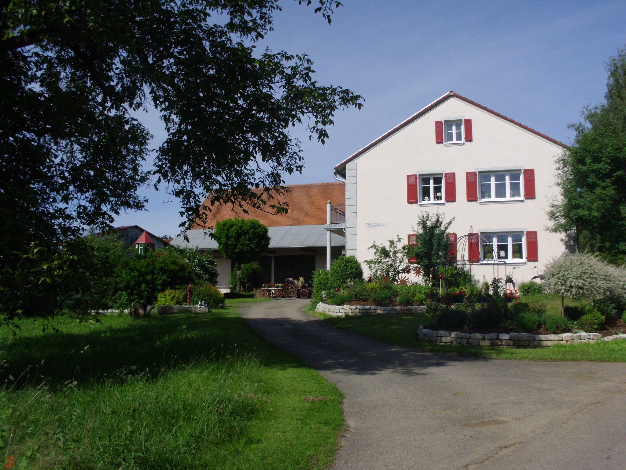 Ziegelhütte, Ortsteil des Marktes Heidenheim im mittelfränkischen Landkreis Weißenburg-Gunzenhausen, Anwesen "Ziegelhütte 1"